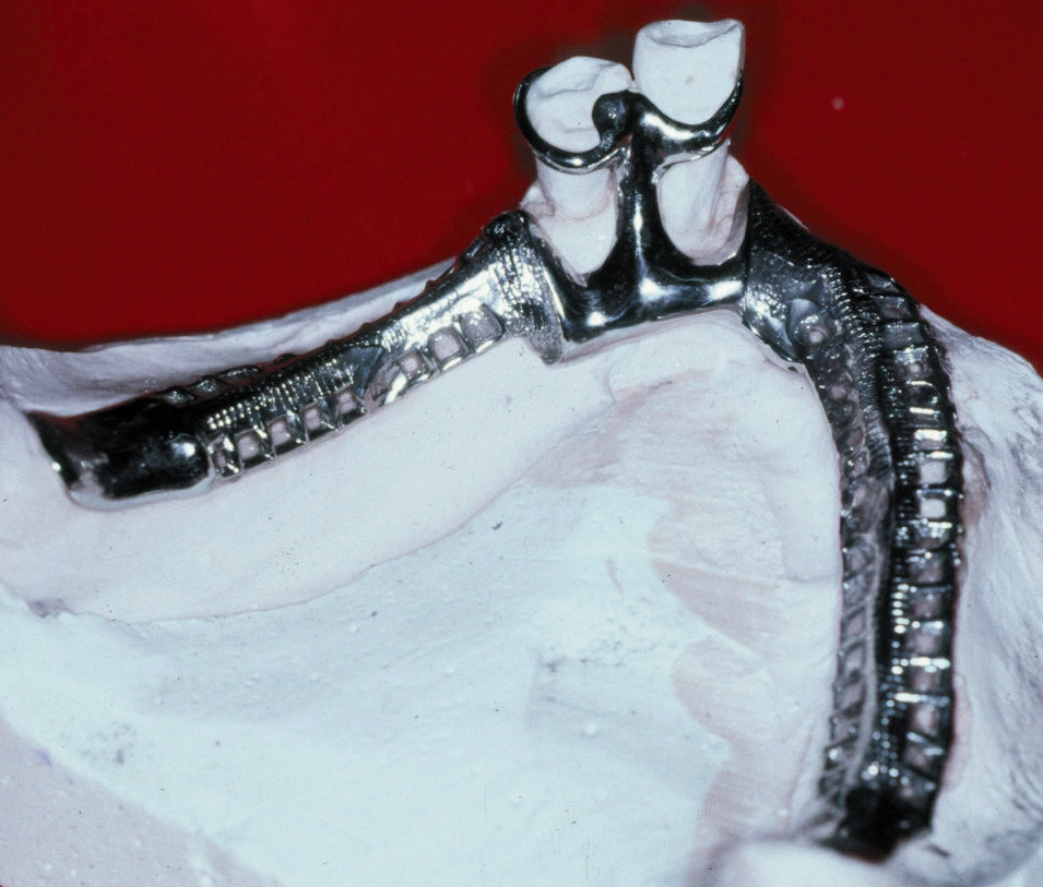 Gerüst für eine Unterkiefer-Modellgussprothese aus einer Chrom-Cobalt-Molybdän-Legierung auf dem Arbeitsmodell.